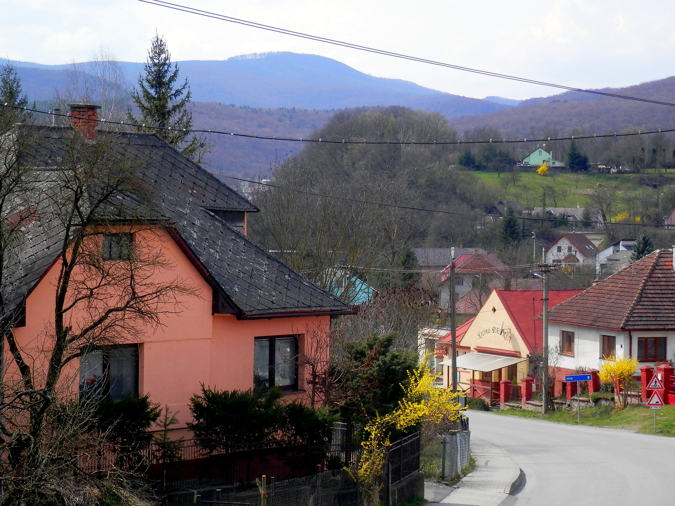 Obec Obišovce, okres Košice-okolie